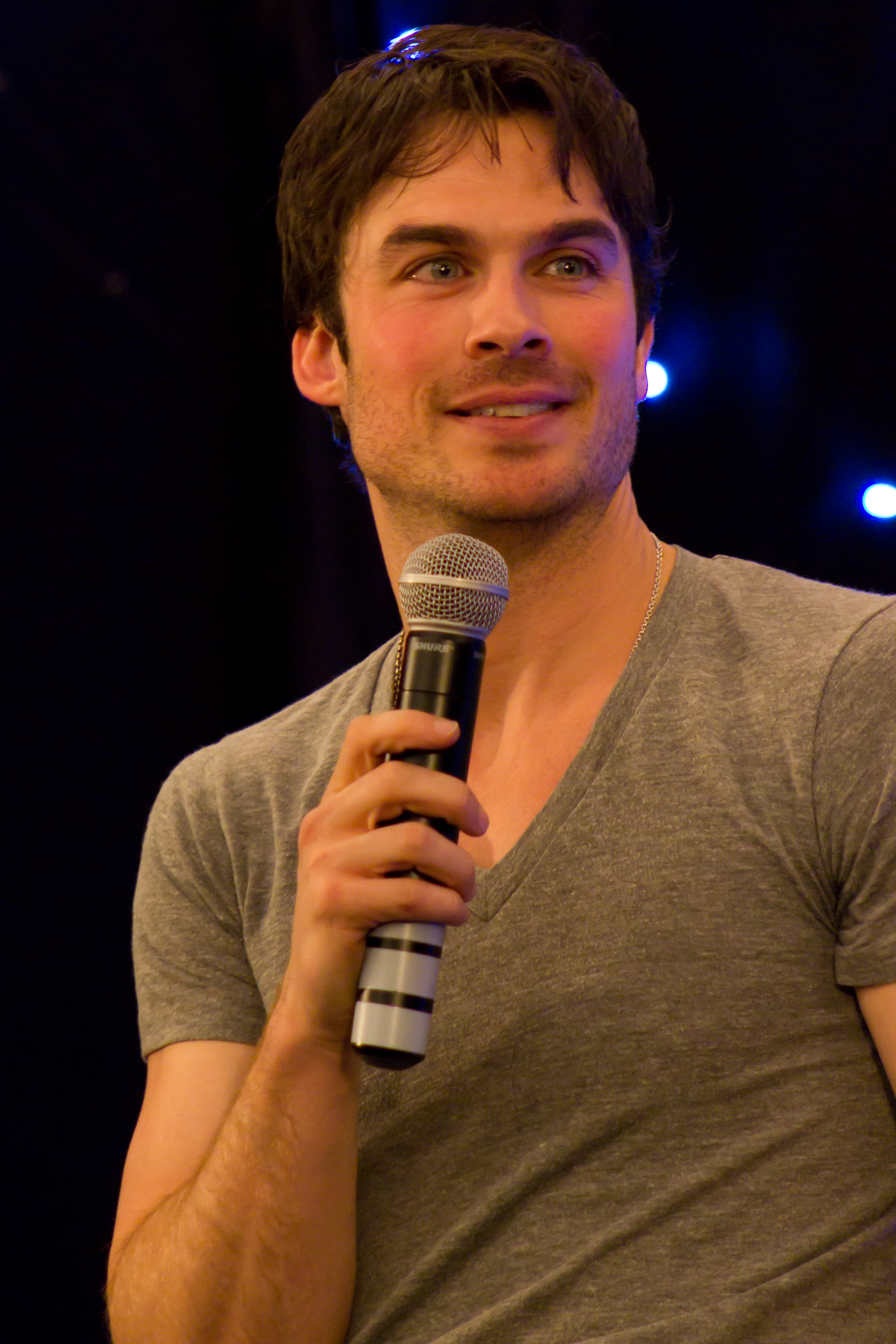 Ian Somerhalder